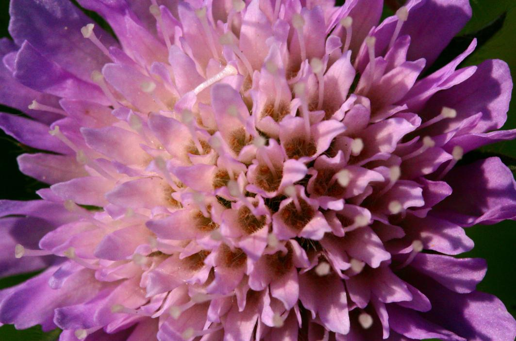 Knautia arvensis